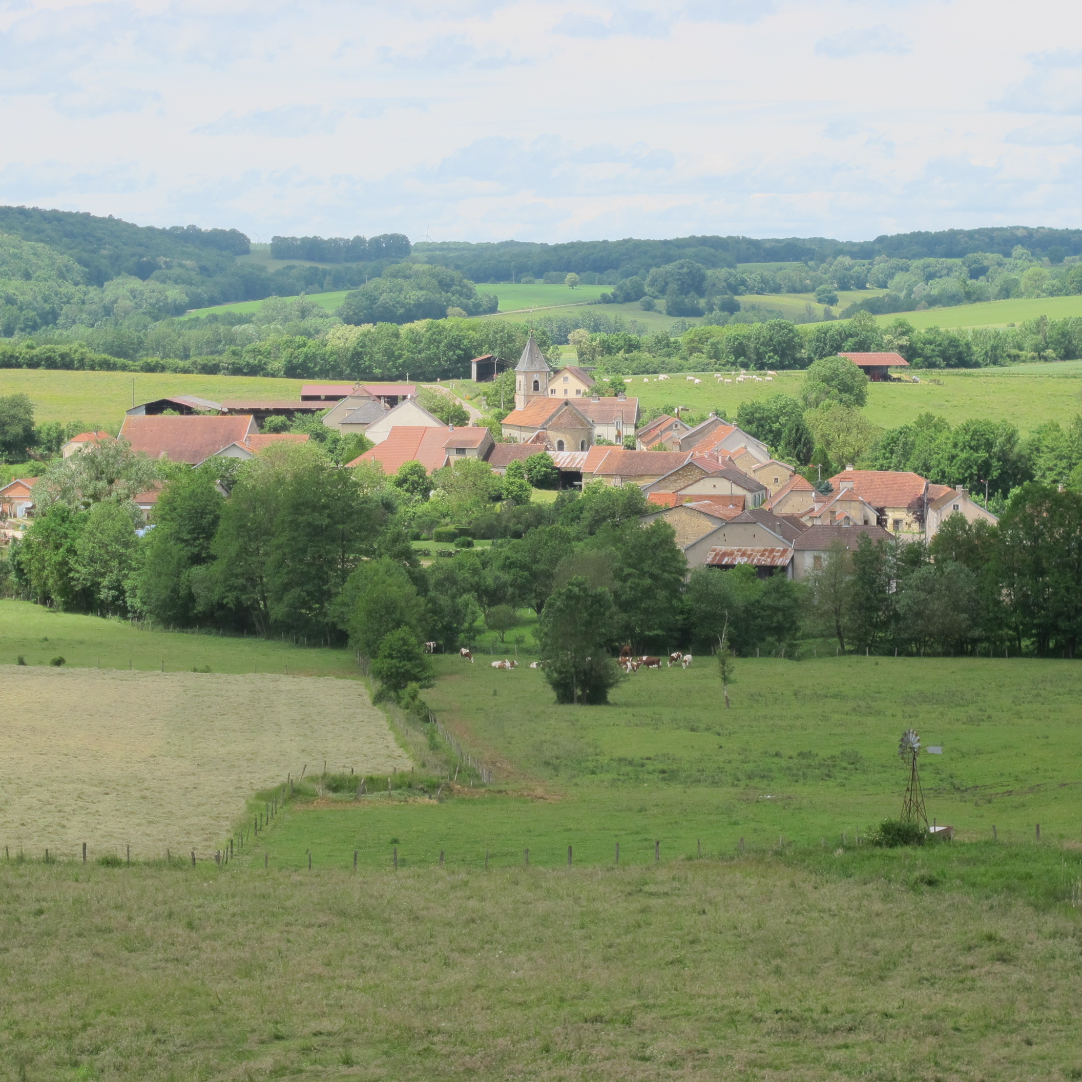 Grandchamp (52600), Haute-Marne - Vue générale à partir de la route des Tilleuls (D17)